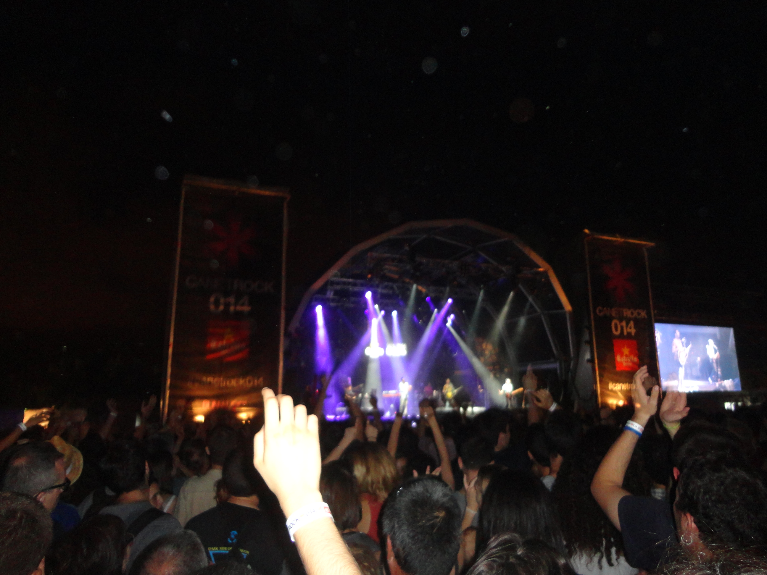 escenari nit del Canet Rock 2014